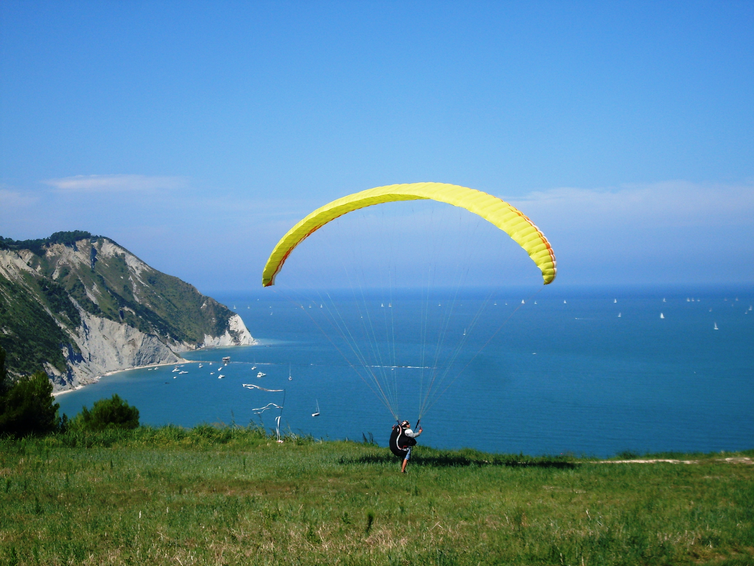 Parapendio pronto al decollo Portonovo (AN) 2014